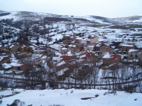 El pueblo soriano de Valloria en invierno, mostrando un paisaje nevado.